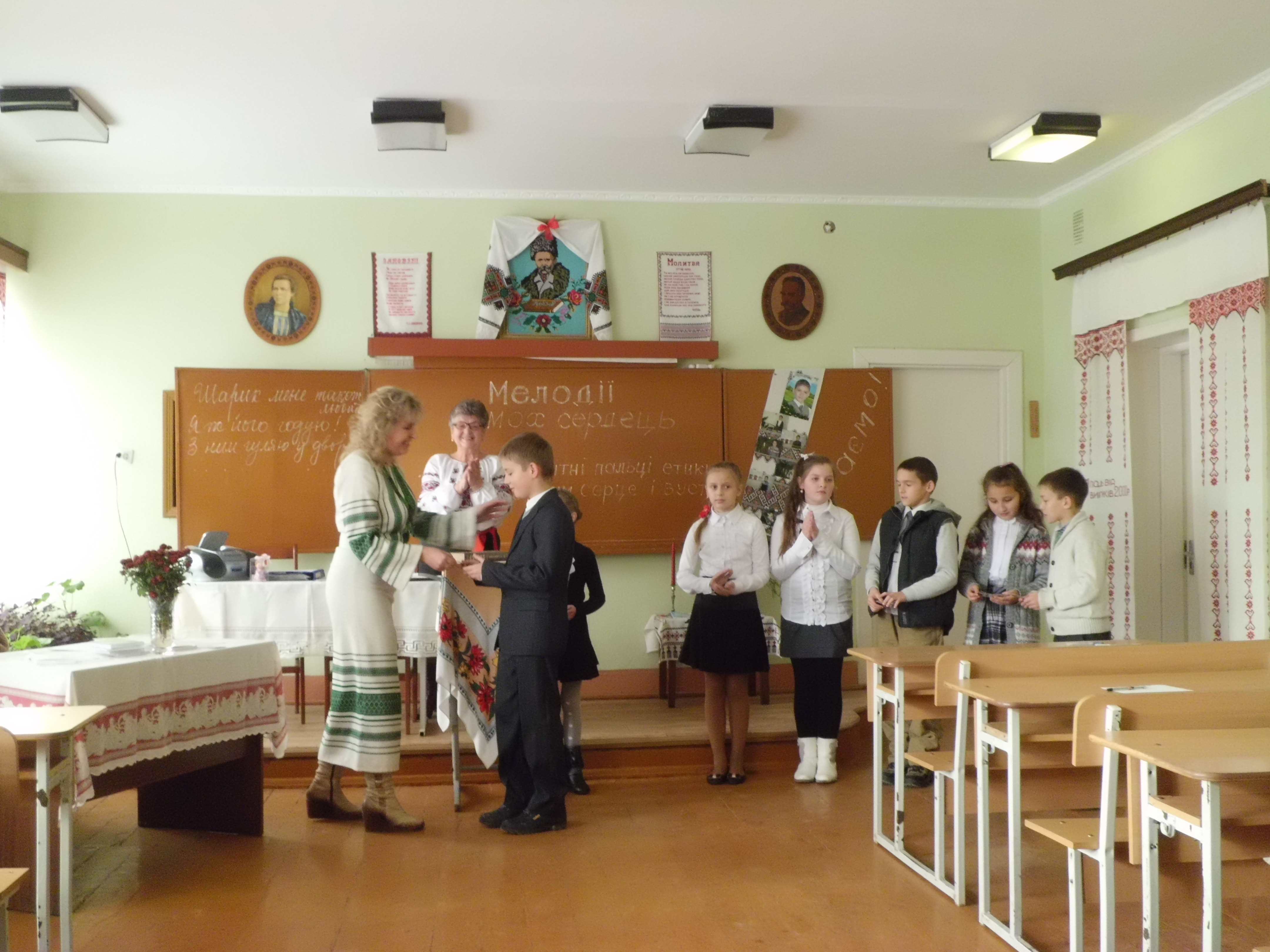 Раїсу Обшарську часто запрошують у школи Чортківського району Тернопільської області для презентації збірок